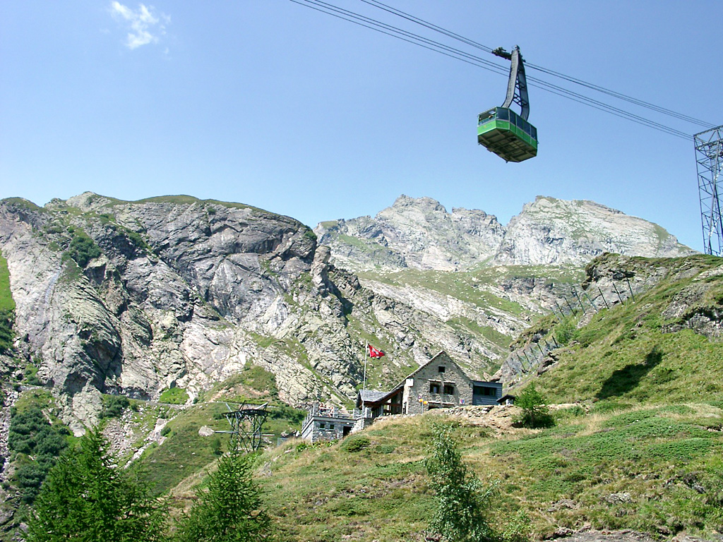 CAS Capanna Basodino ( 1856 m.ü.M.) mit Seilbahn St.Carlo - Robiei oberhalb des Maggiates im Schweizer Kanton Ticino.